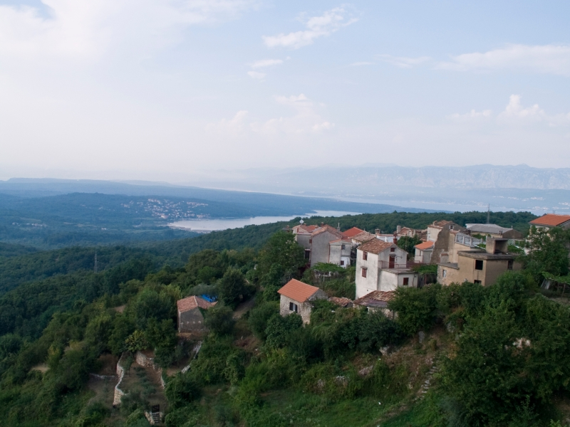 Dobrinj i Čižići na otoku Krku